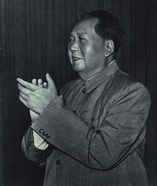 1966-09 1966年毛泽东在中共八大11中全会